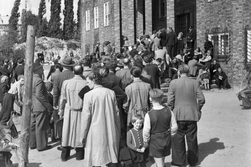 August 1952 Meldestelle des Westberliner Senats für Ostflüchtlinge in der Kuno-Fischer-Str.